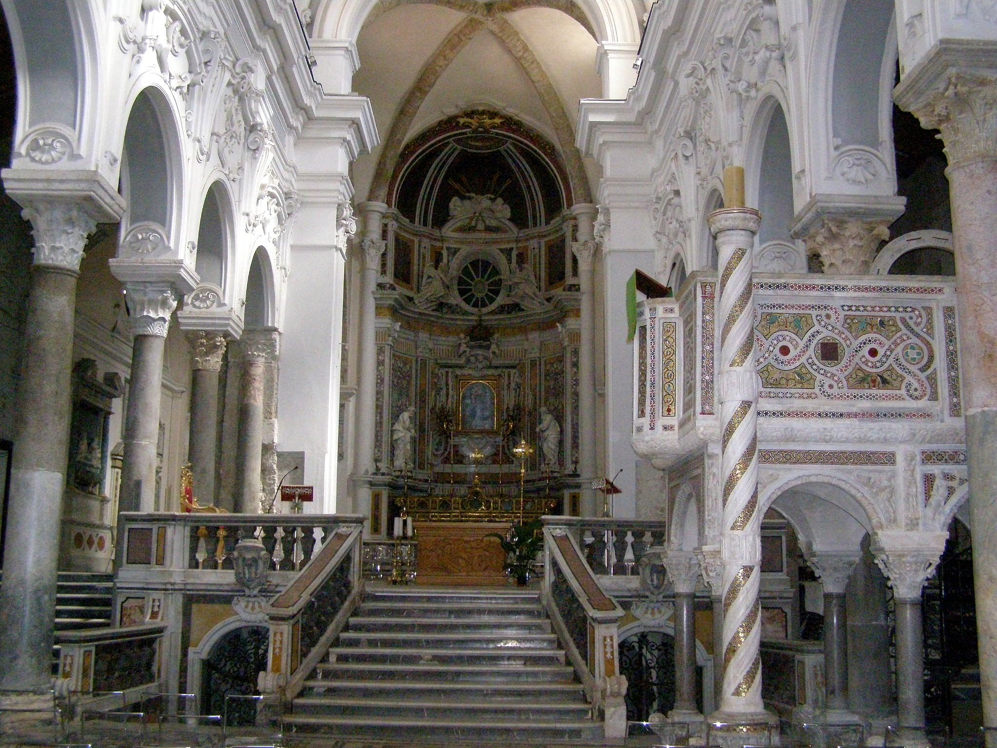 Interiér katedrály